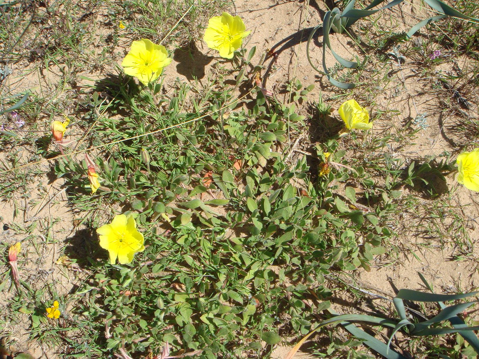 Oenothera drummondii, Chiclana, Cádiz, España